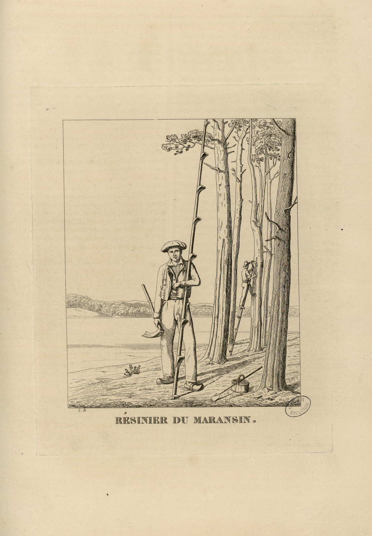 Fait partie d'un recueil des 36 premiers numéros du Pélerin, chaque numéro étant accompagné d'une gravure Ancely, René (1876 - 1966). Possesseur